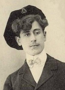 Un étudiant de Bordeaux coiffé de sa faluche.